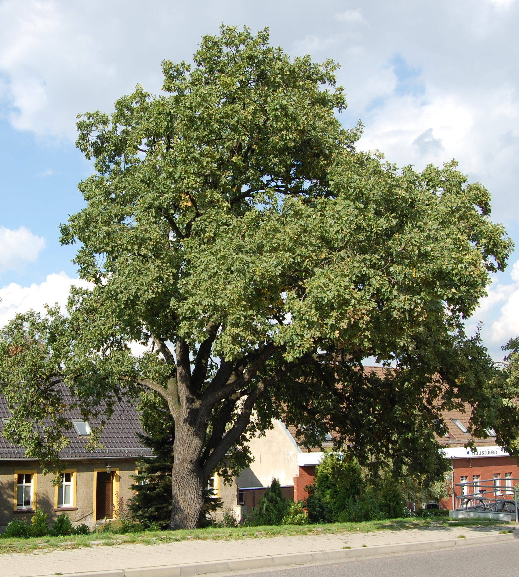 Eiche vor der Sohlener Straße 3 in Magdeburg-Westerhüsen